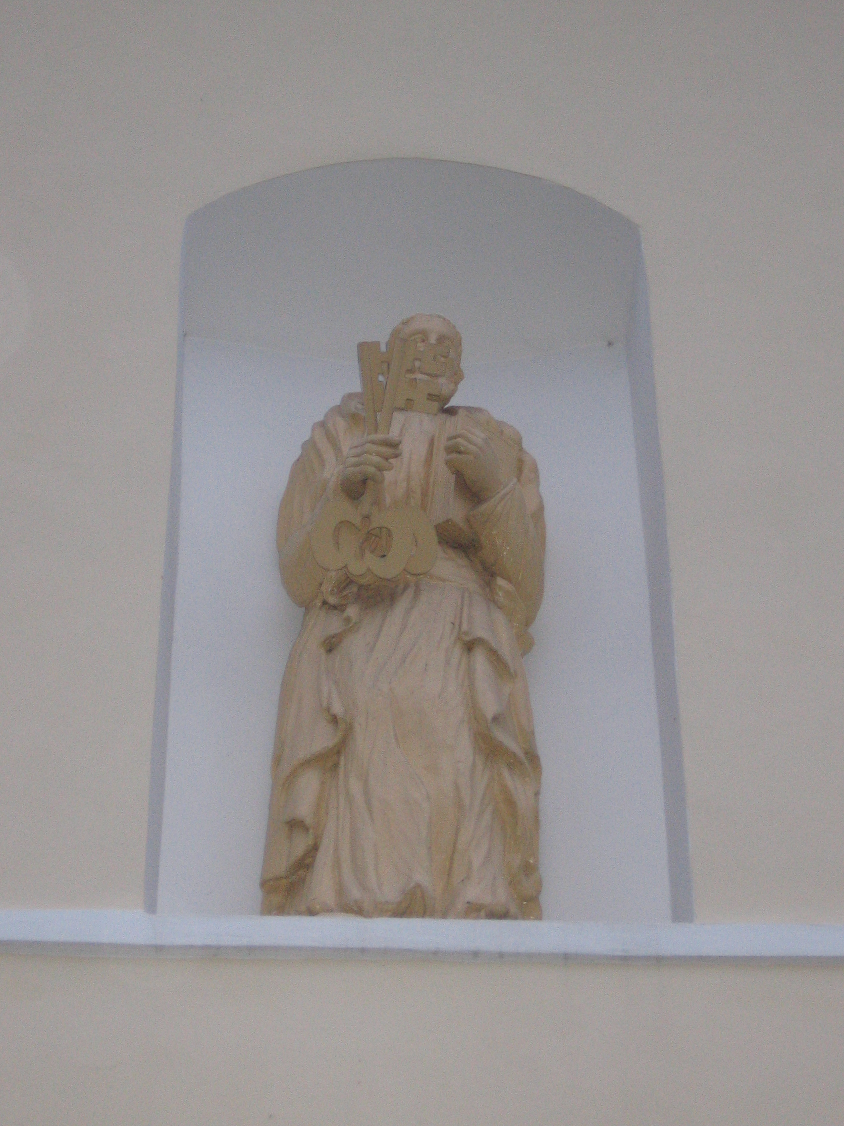 Беларуская (тарашкевіца): Касьцёл Найсьвяцейшай Тройцы (Шарашоў) This is a photo of Belarusian heritage monument. Reference number: 113Г000657 ( WLM)